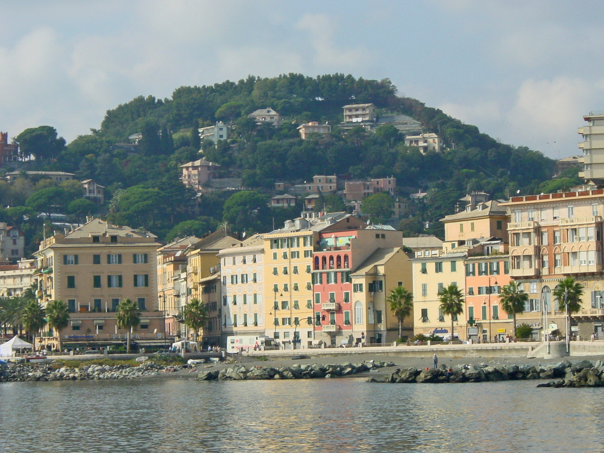 Lungomare all'altezza di Largo Calasetta e di Via De Nicolay (al civico n° 12 vi nacque Fabrizio De André). Sullo sfondo la Vetta di Pegli.